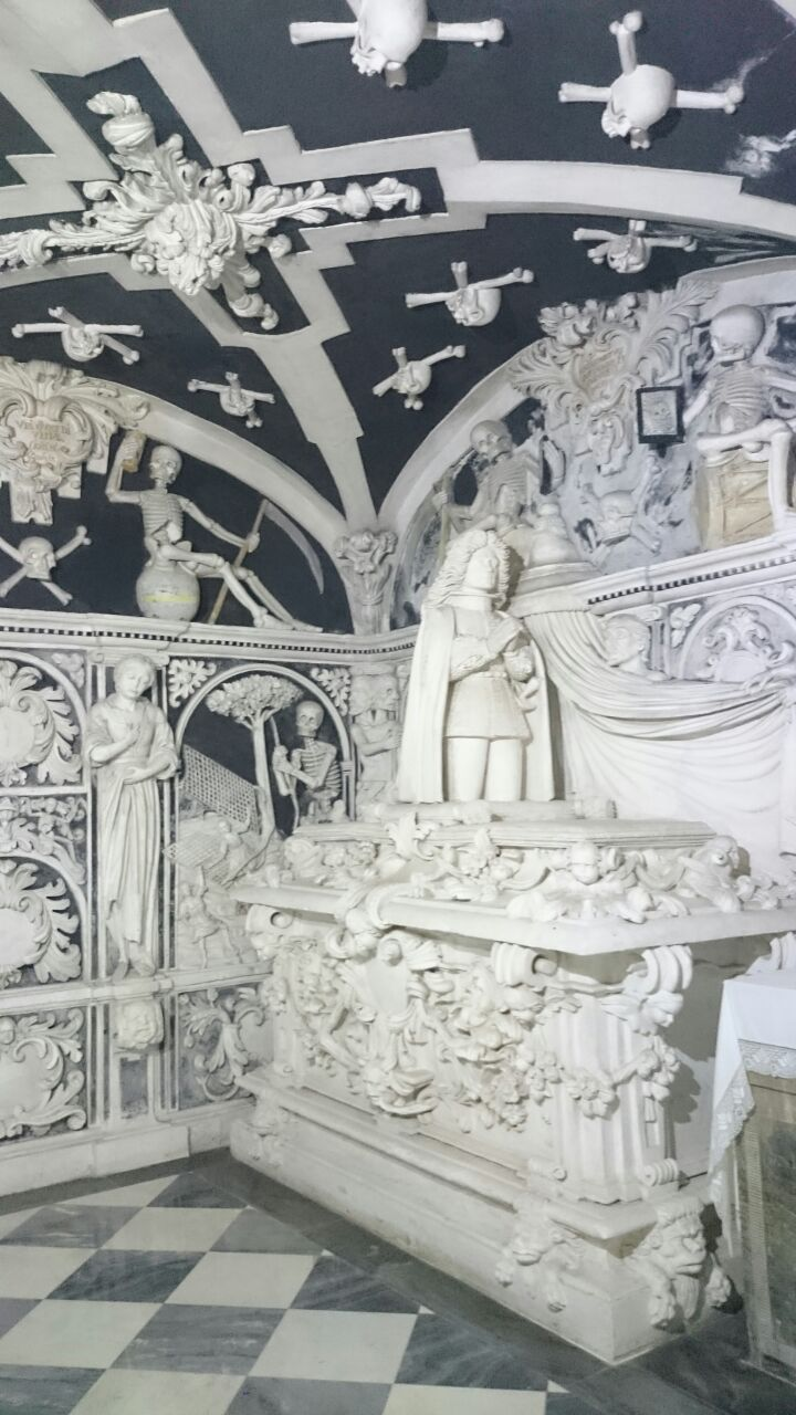 Panteón de los Condes de Buenavista.